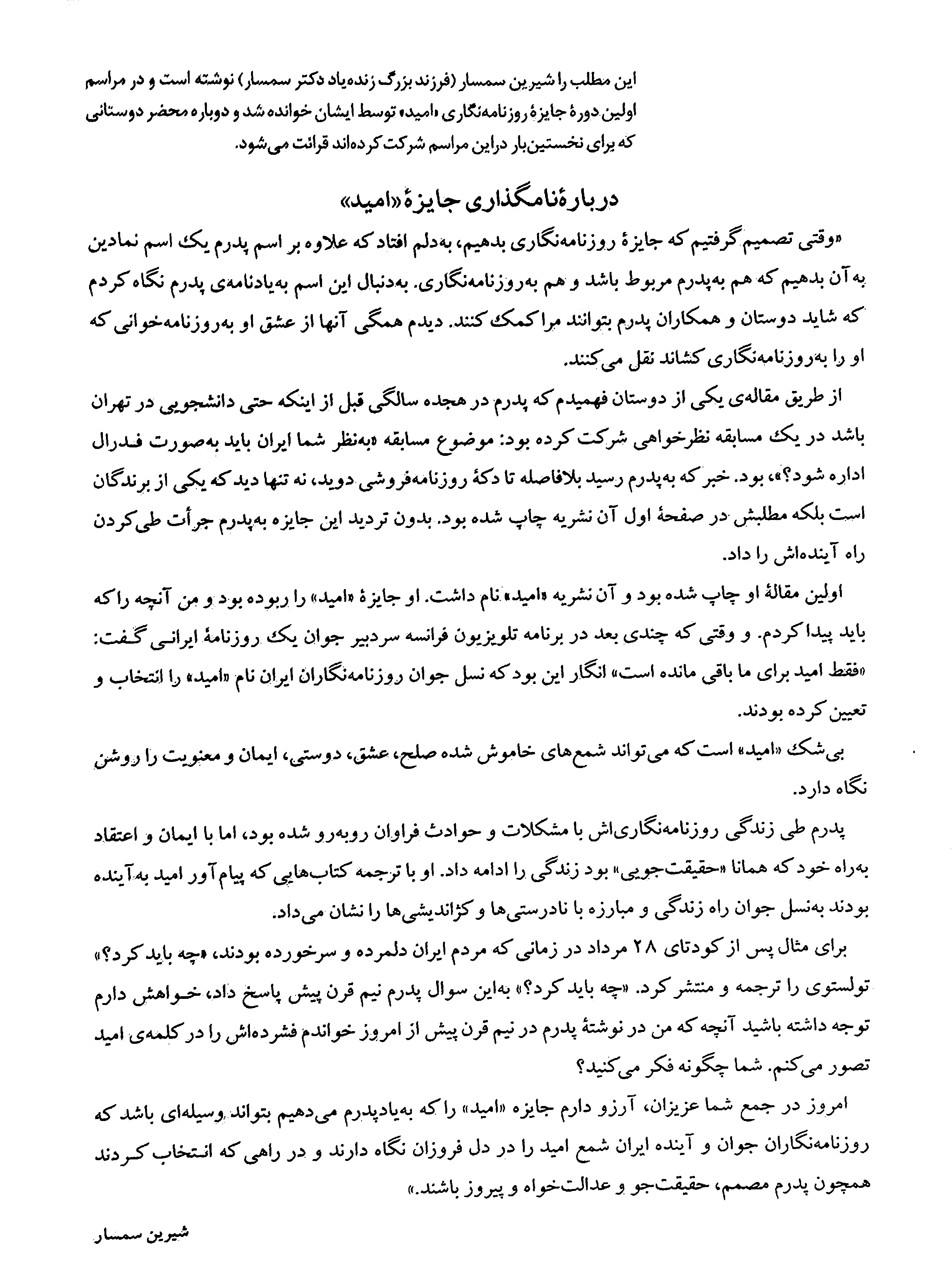 این مطلب را شیرین سمسار (فرزند بزرگ زنده یاد دکتر مهدی سمسار( نوشته است و در مراسم اولین دوره ی جایزه روزنامه نگاری «امید» توسط ایشان خوانده شد پس از آن نیز در هر دوره در محضر مدعویین مراسم جایزه امید توسط یکی از برندگان ادوار گذشته خوانده می شود.